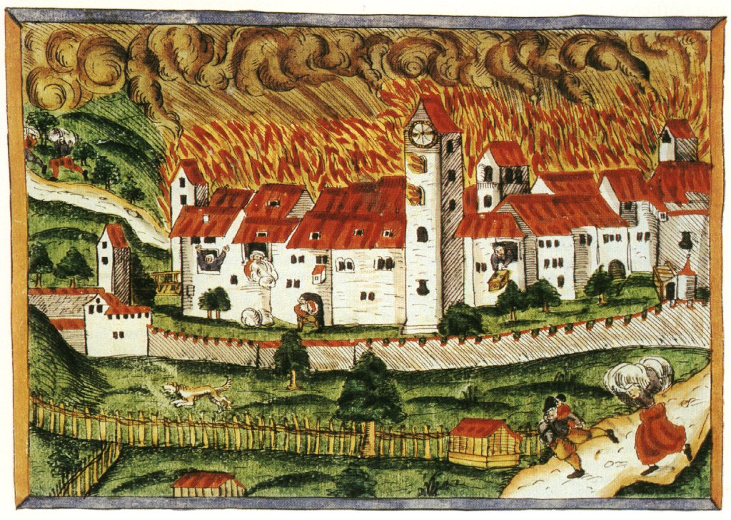 Wickiana Lügentliche und warhafte beschrybung der kläglichen Brunst zu Klingnouw - Stadtbrand von Klingnau im Jahr 1586